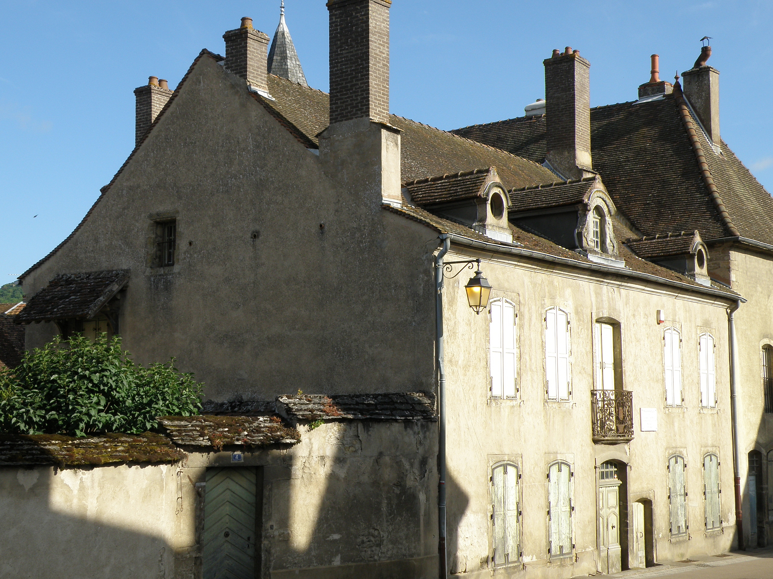 Nolay (Côte-d’Or, Bourgogne, France). Maison natale de Lazare Carnot, rue Sadi Carnot.